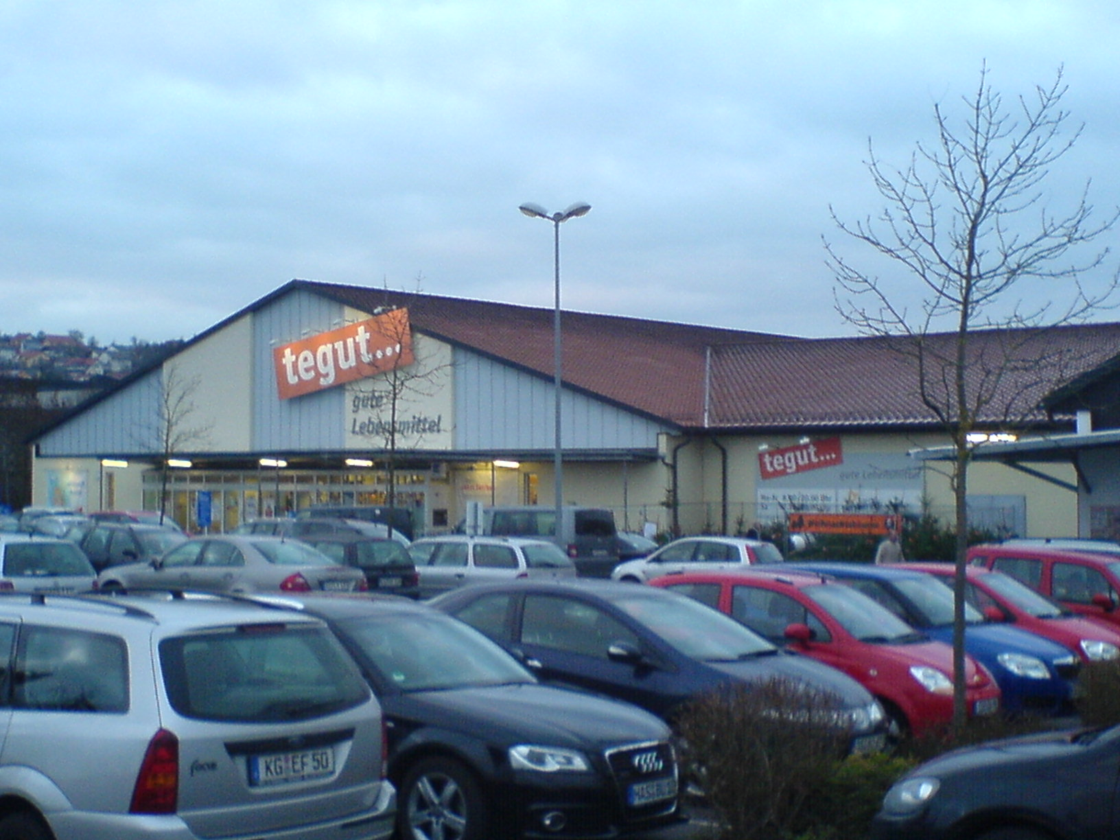 tegut… Gutberlet Stiftung & Co. Bad Kissingen.